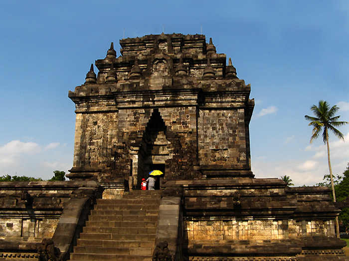 Candi Mendut di Magelang, Jawa Tengah, Indonesia